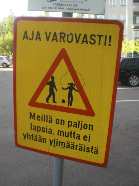 Surstrata signalo en la finna lingvo (Lahtio)